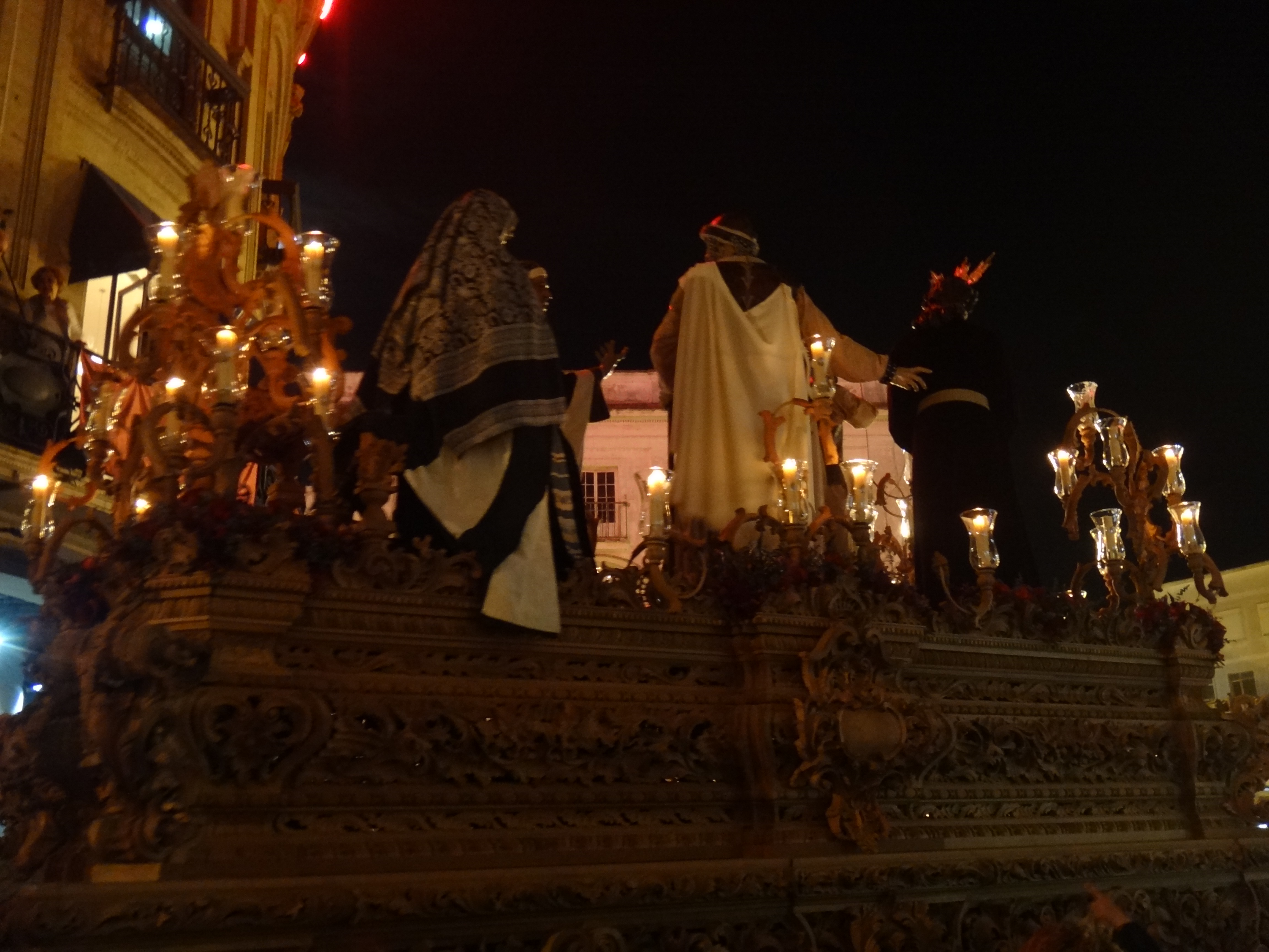 La Redención. Semana Santa de Jerez de la Frontera 2015 (Andalucía, España)